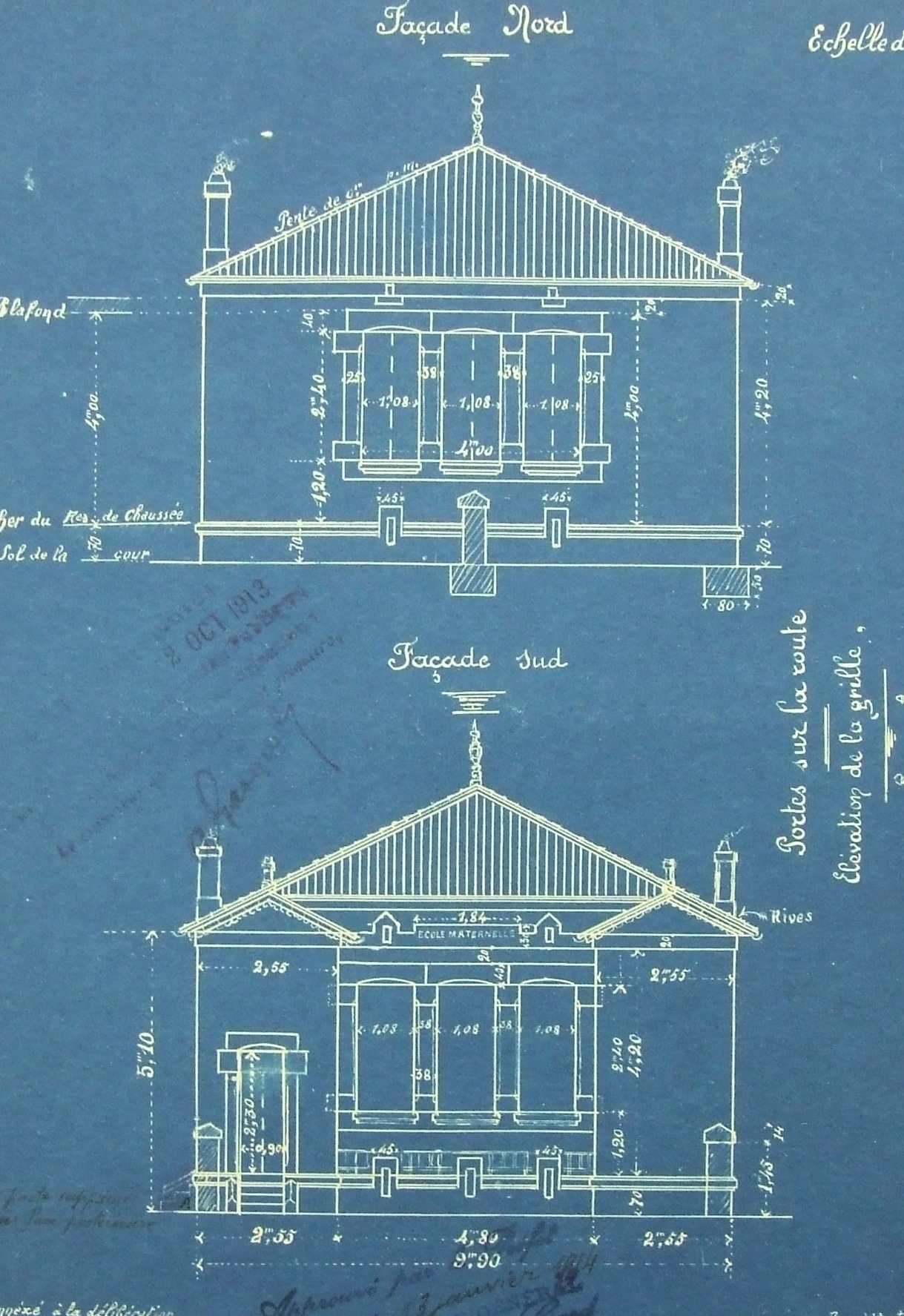 Laudun-l'Ardoise (Gard - France) - Elévation et coupe du groupe scolaire mixte